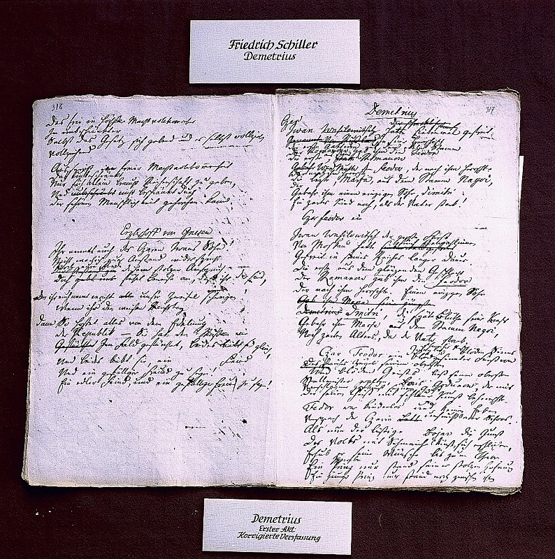 Original image description from the Deutsche FotothekWeimar. Zwei handgeschriebene Seiten von Friedrich Schiller: „Demetrius“ (erster Akt)